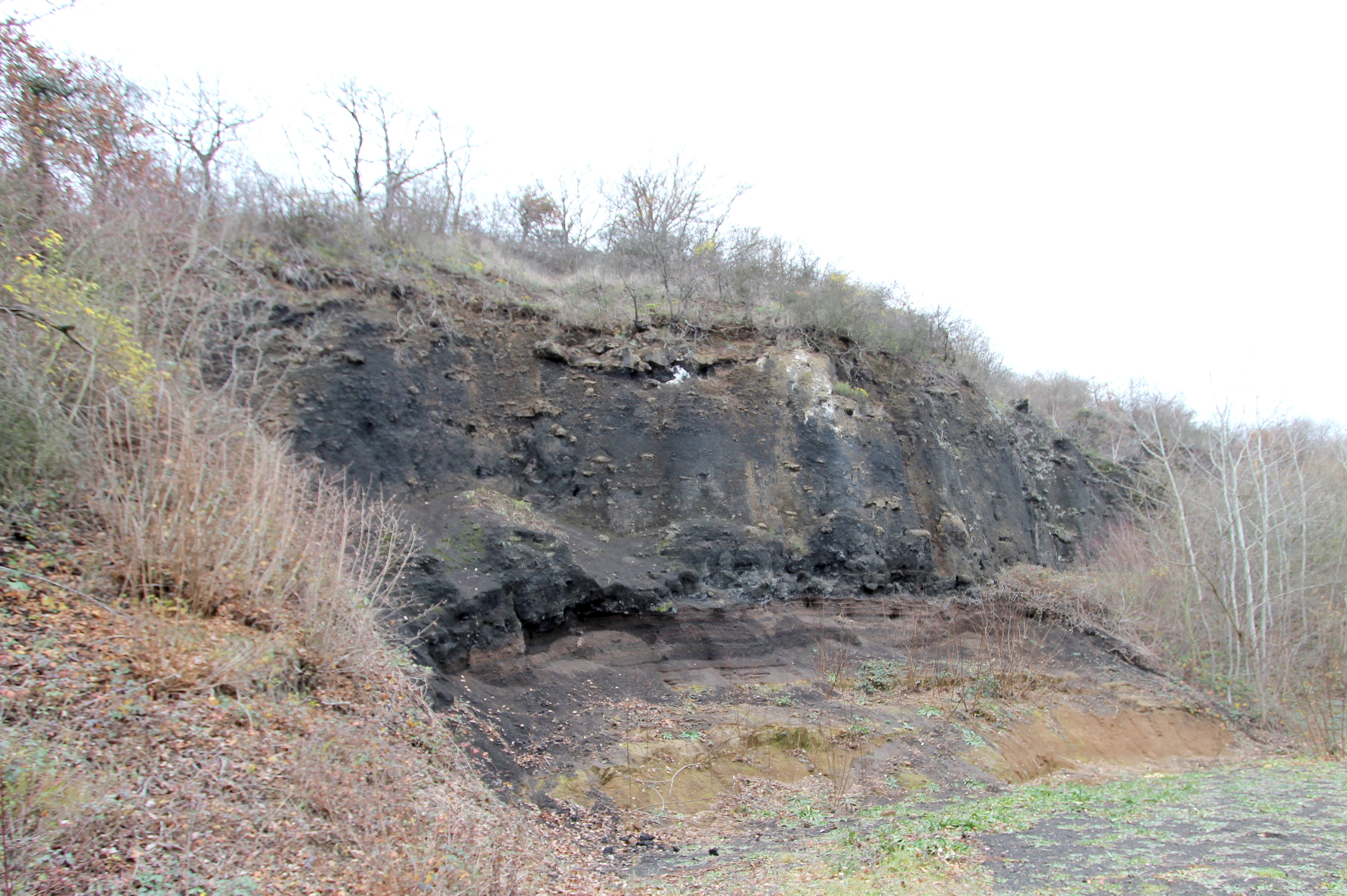 56651 Niederzissen, Kraterstraße. Bis heute ist der Bausenberg der am besten erhaltene Hufeisenkrater der Eifel! Am Krater und an seinem Wall besteht eine große Vielfalt unterschiedlicher Biotoptypen. So bietet der Niederzissener Hausberg weit über 500 Pflanzenarten und einer Tierwelt mit mehr als 5.000 verschiedenen Arten ein Zuhause, welches unter Naturschutz steht. Aufnahme von 2017.